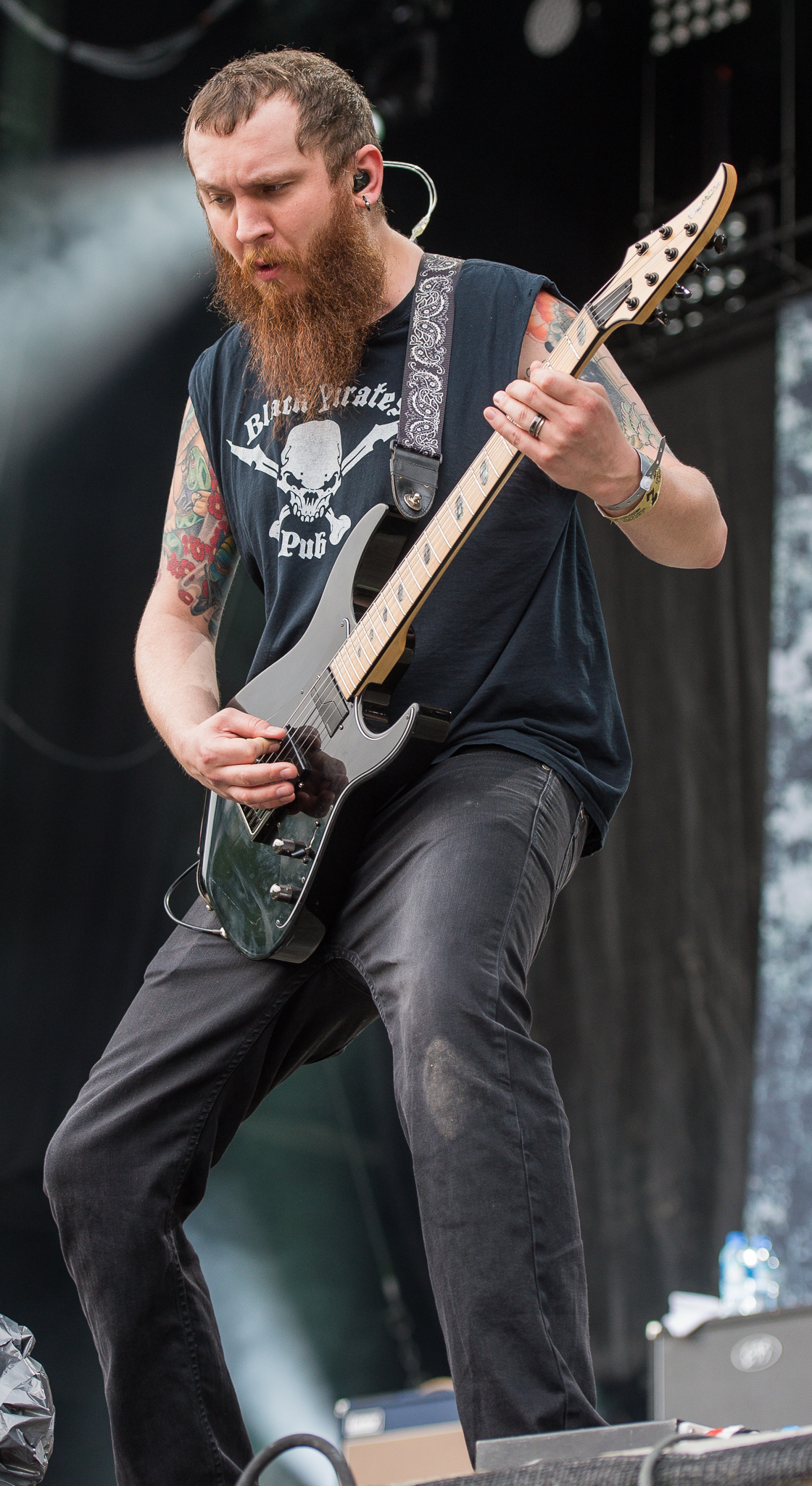 ARGO-Konzerte,Beck's Park Stage,Festival,Joel Stroetzel,Killswitch Engage,Konzert,Livekonzert,Livemusik,Musik,RiP,Rock im Park 2016